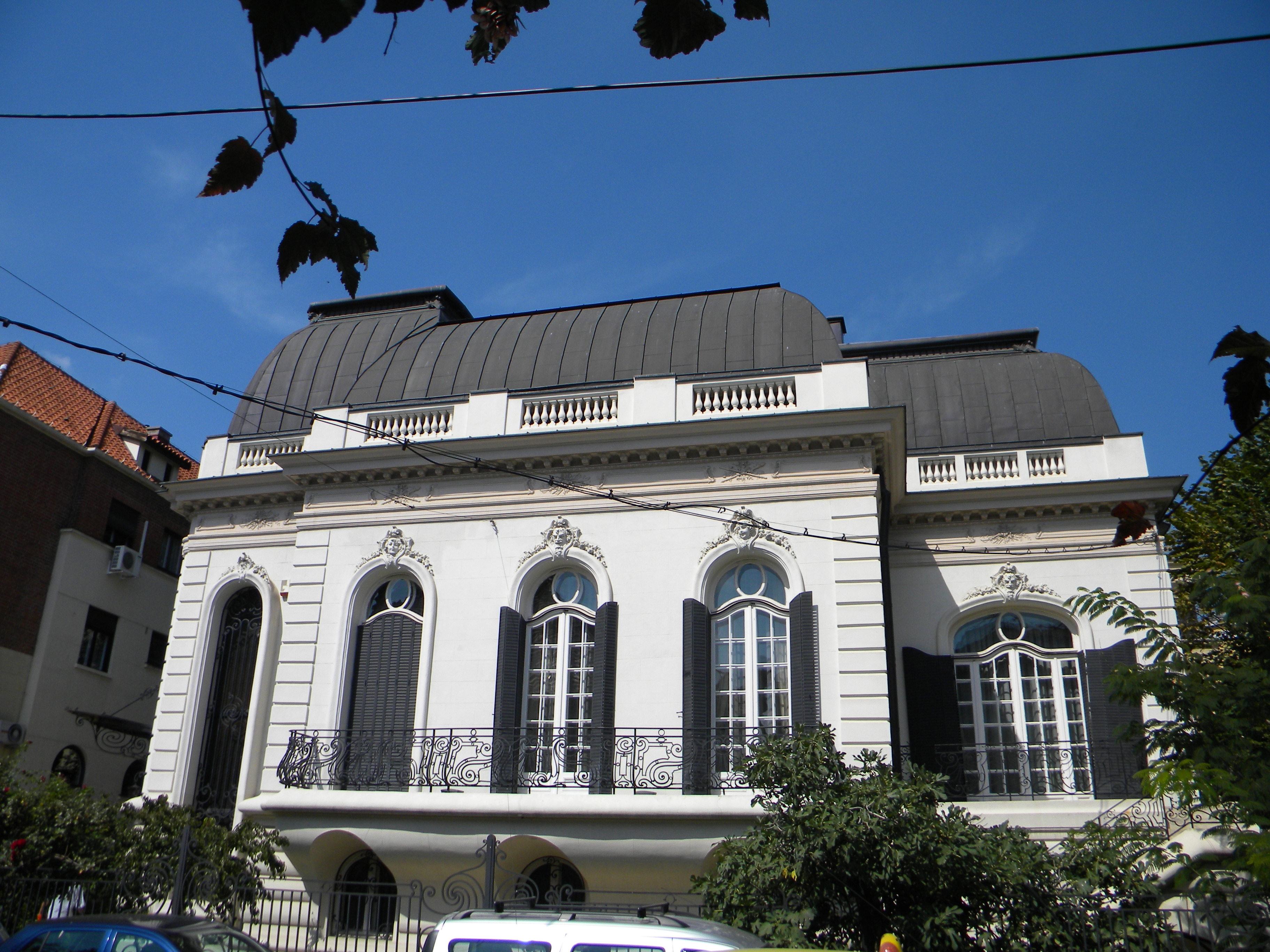 Casa pe Str. Dumbrava Rosie nr. 9, Bucuresti sect. 2